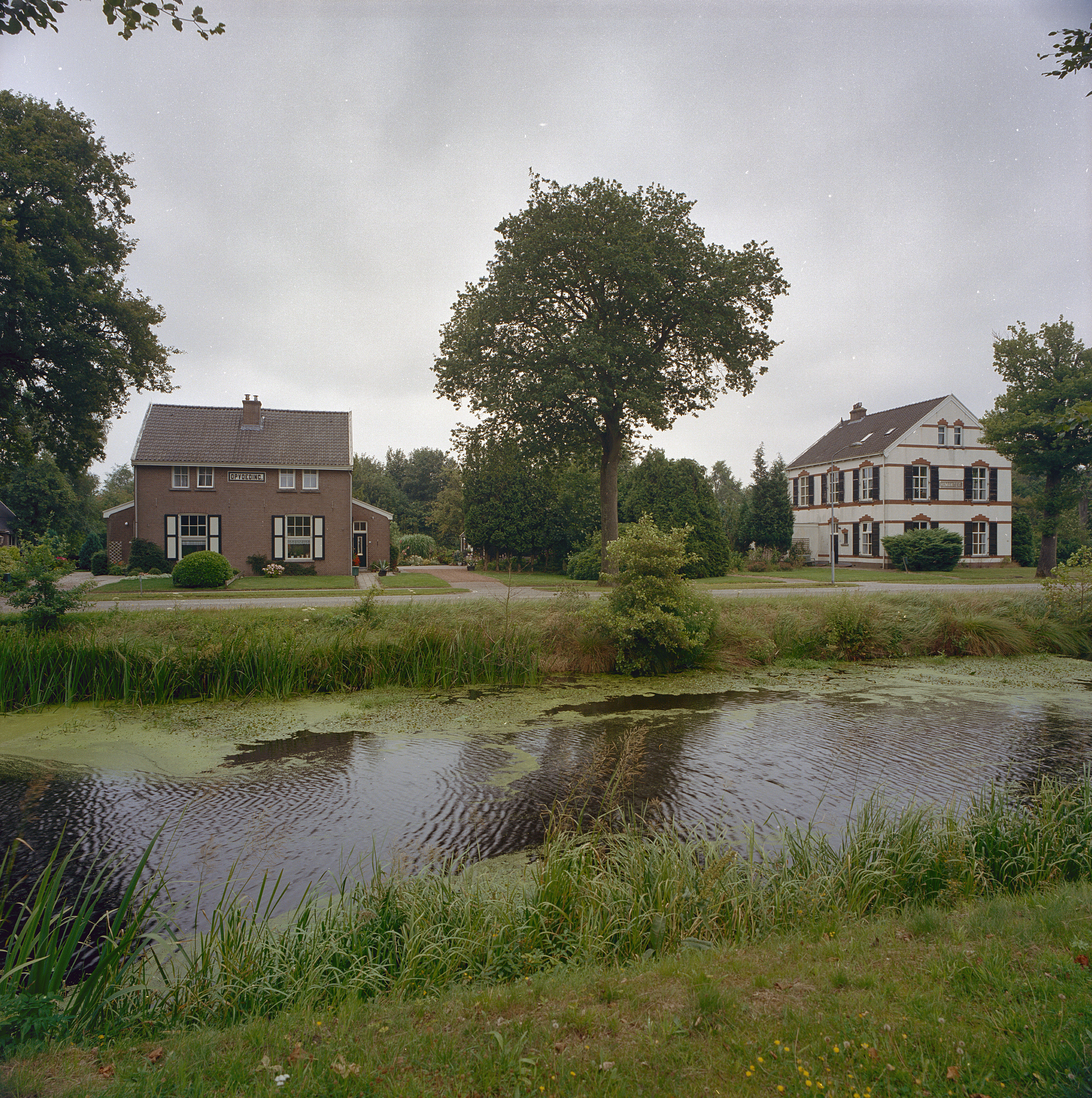 Strafkolonie Veenhuizen: Overzicht met op de voorgrond de Kolonievaart, 2002. Links Opvoeding (rm 469422), recht Humaniteit (rm 469421). Opmerking: Gefotografeerd voor het Monumenten boek, Karel Loeff, bladzijde 299.